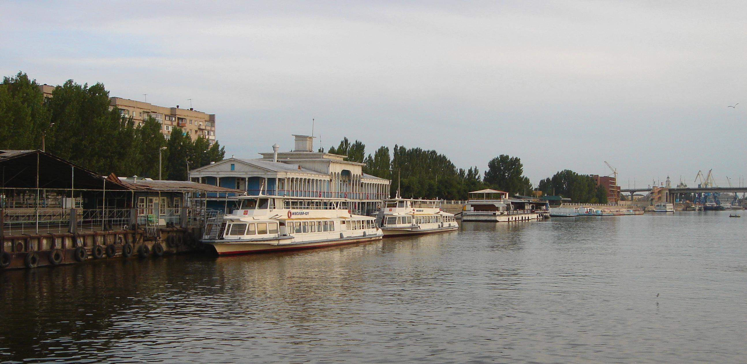 Volga embankment upper the New Bridge. Набережная Волги выше Нового Моста.